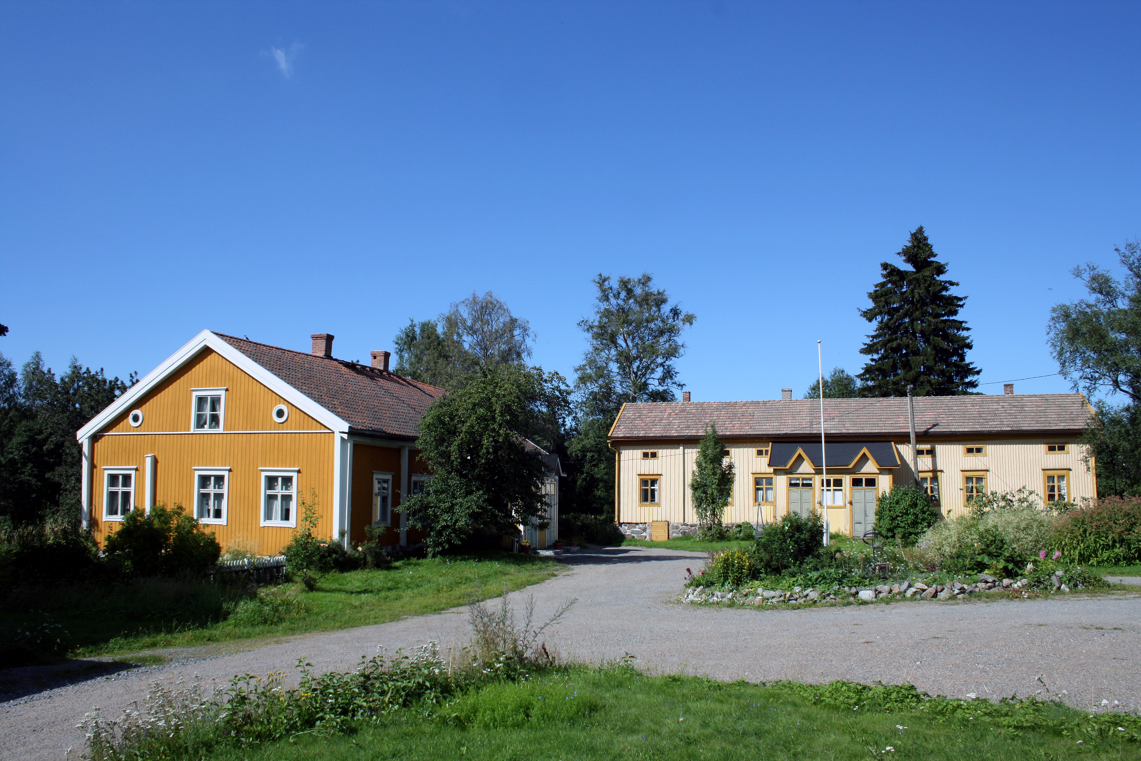 Kruununvoudintalo Kokkolan Hakalahdessa.